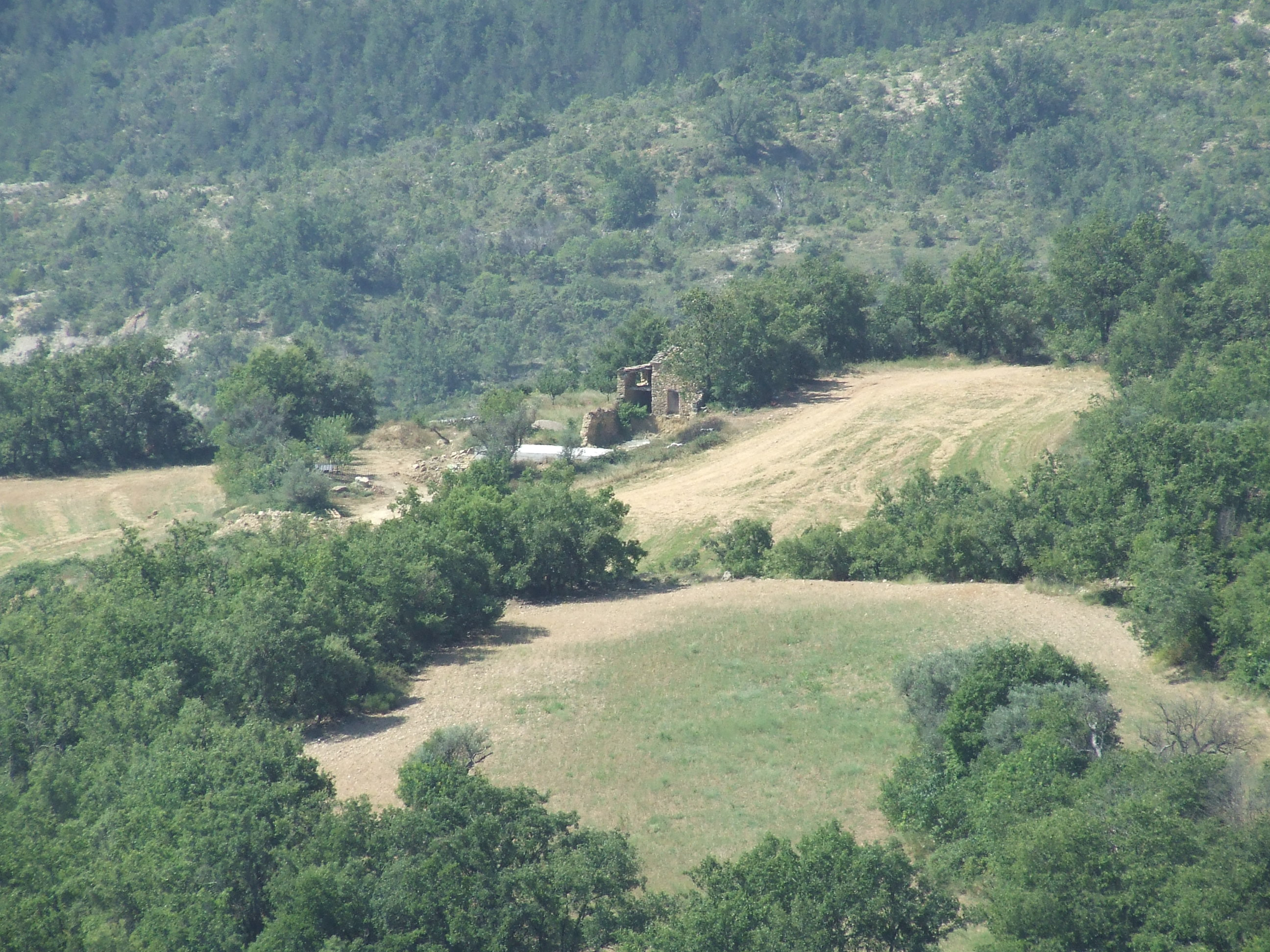 La Masia de Miret (Moror, Sant Esteve de la Sarga, Pallars Jussà)